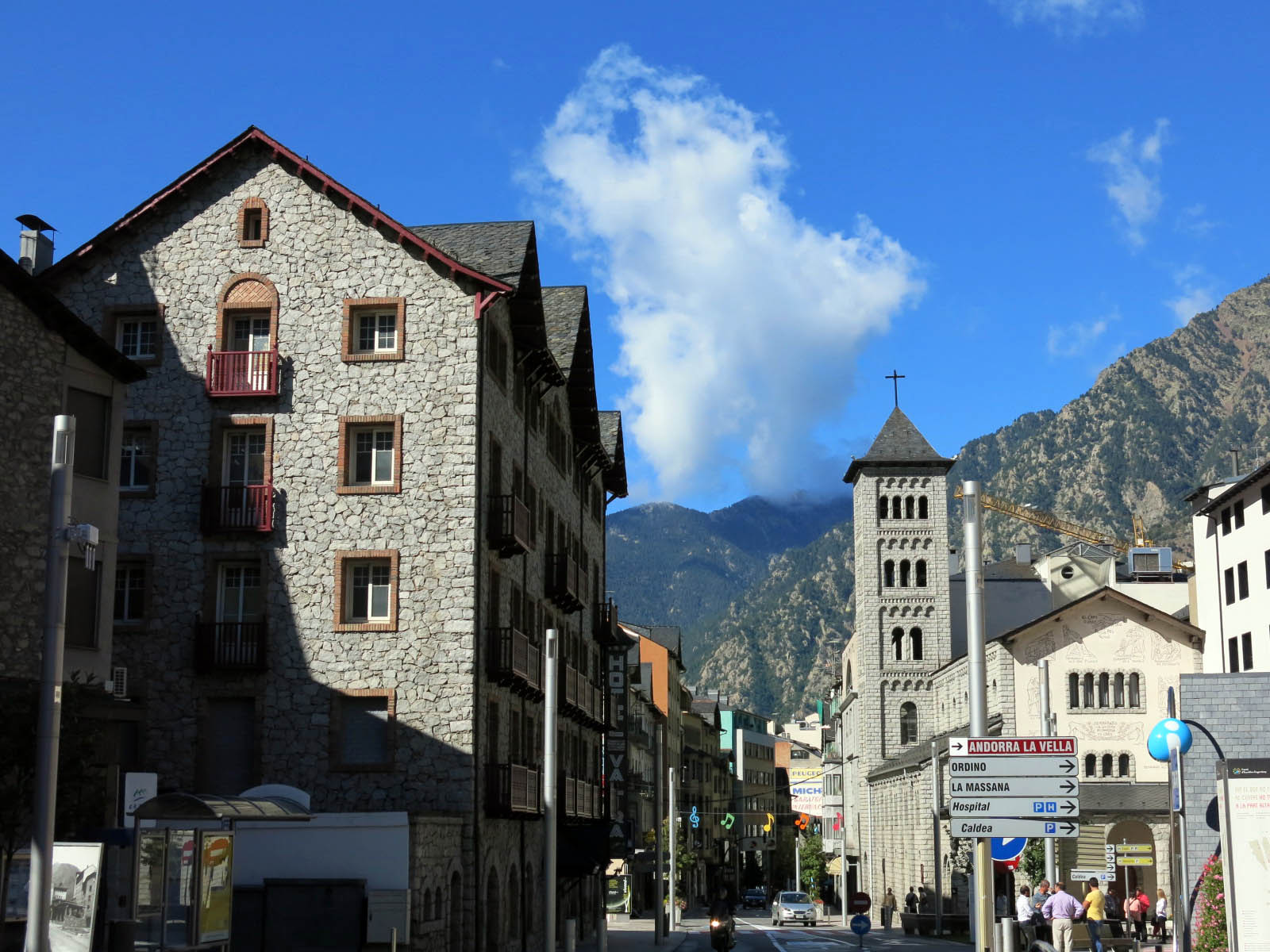 Església de Sant Pere Màrtir (Escaldes-Engordany)